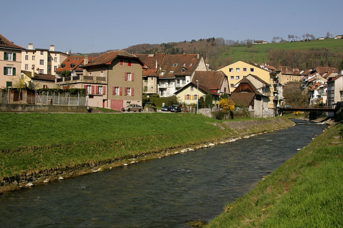 Moudon: La Broye